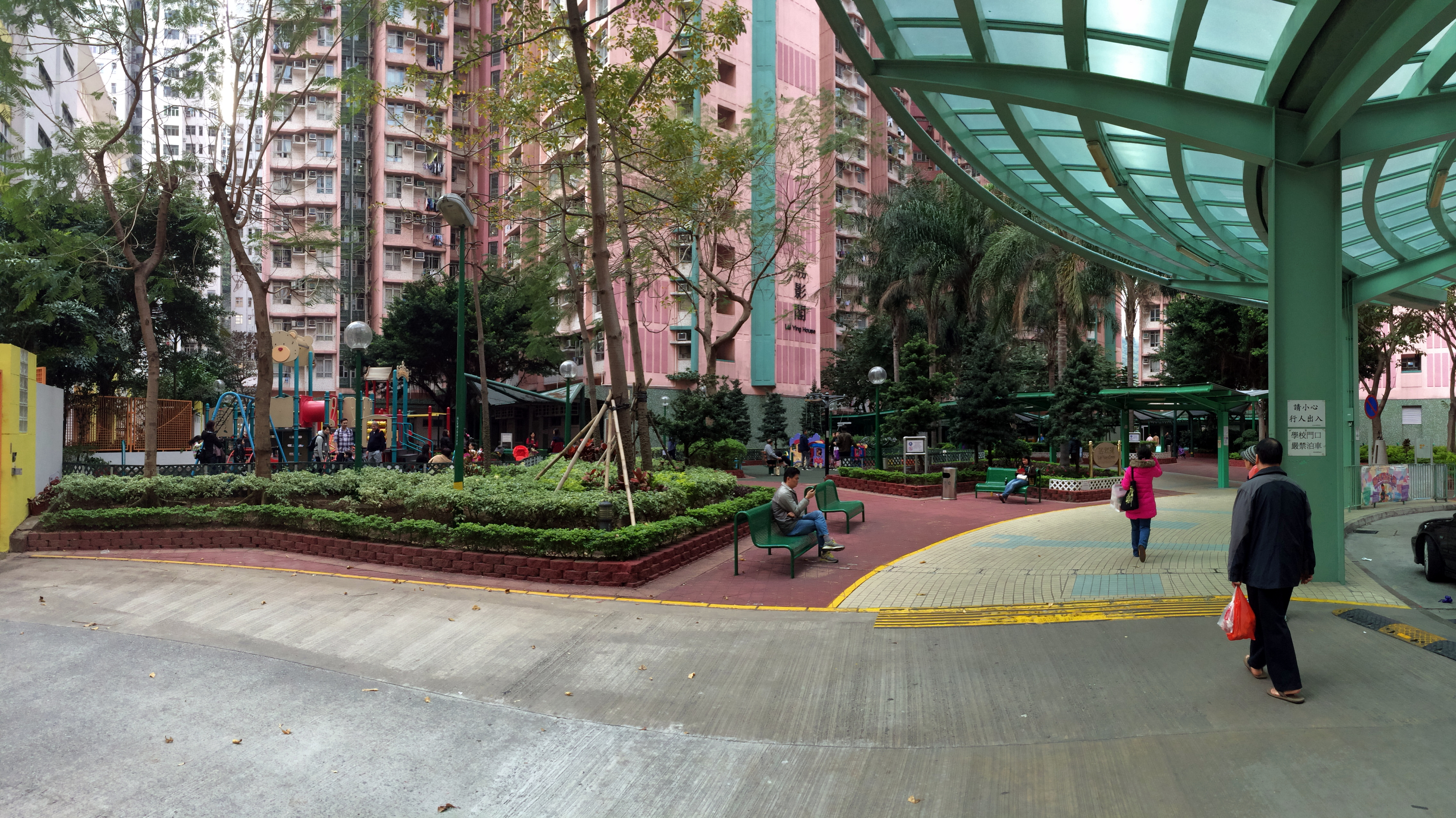 Lai Yan Court Garden